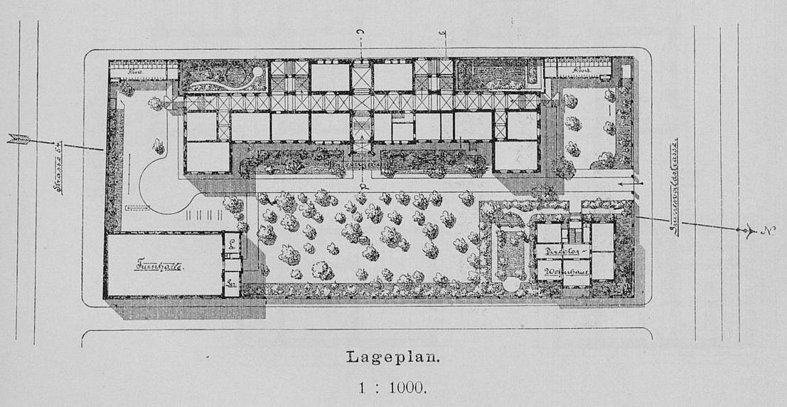 Prinz-Heinrichs-Gymnasium in Berlin-Schöneberg, Lageplan im Verhältnis 1:1000 (Zeichnung 1894)